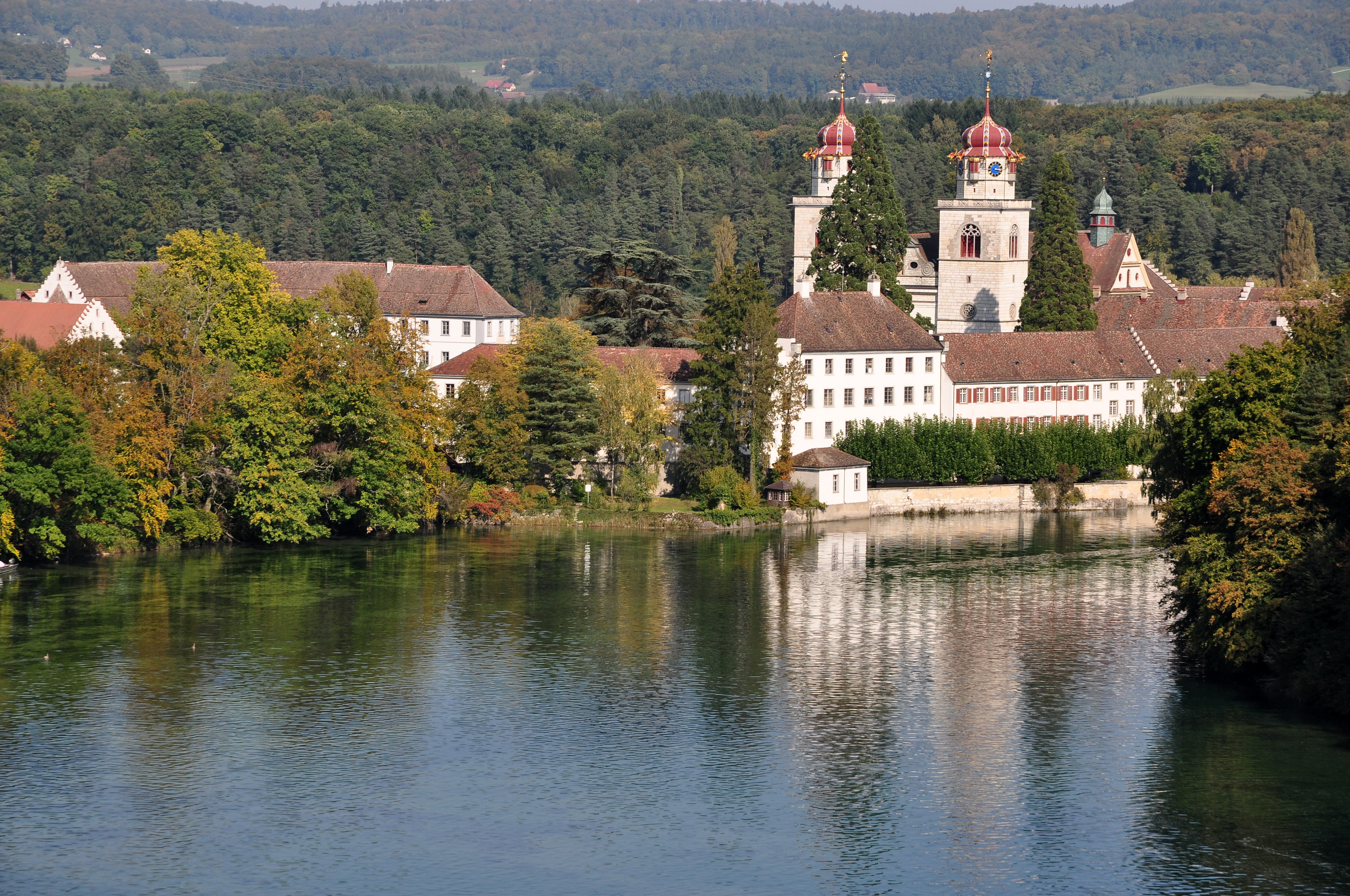 Halbinsel / Insel, keltisches Oppidum / mittelalterliches / neuzeitliches Kloster / Stadt. Prähistorische Wall-Grabenanlage, wiedergenutzt als mittelalterliche Stadtbefestigung in Rheinau (Switzerland)